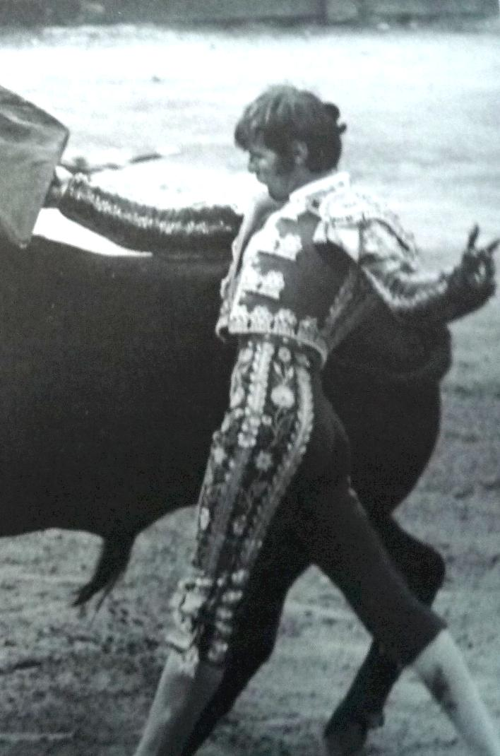 El Codobes (detail)